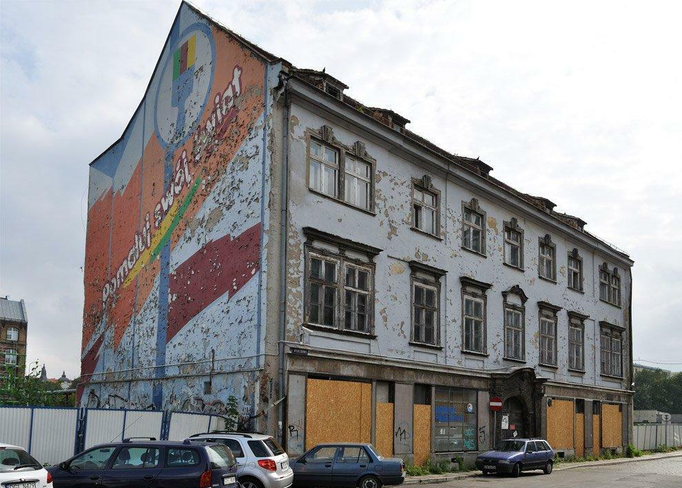 Pałac Oppersdorfów a zanim budowa, która od kilku lat nie może się rozpocząć...